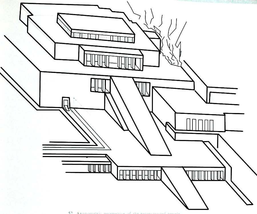 Rekonstruktionszeichnung des Totentempels des Thutmosis III. in Deir el-Bahari nach der Rekonstruktion von J. Lipinska